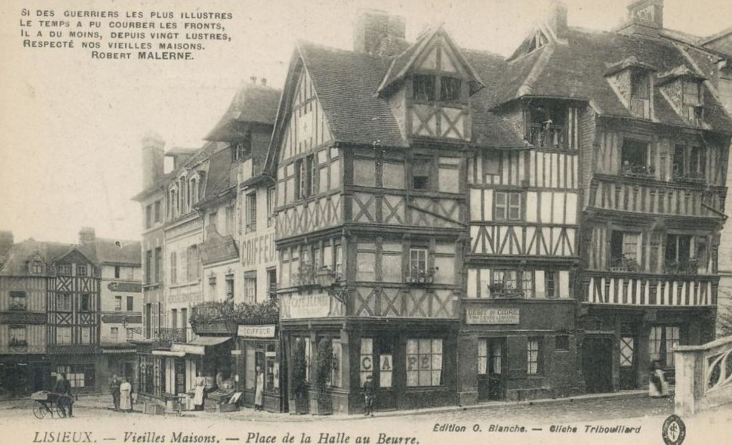 Carte postale du début du XXe siècle avec en illustration photo les maisons à colombages de la place de la Halle au beurre à Lisieux.